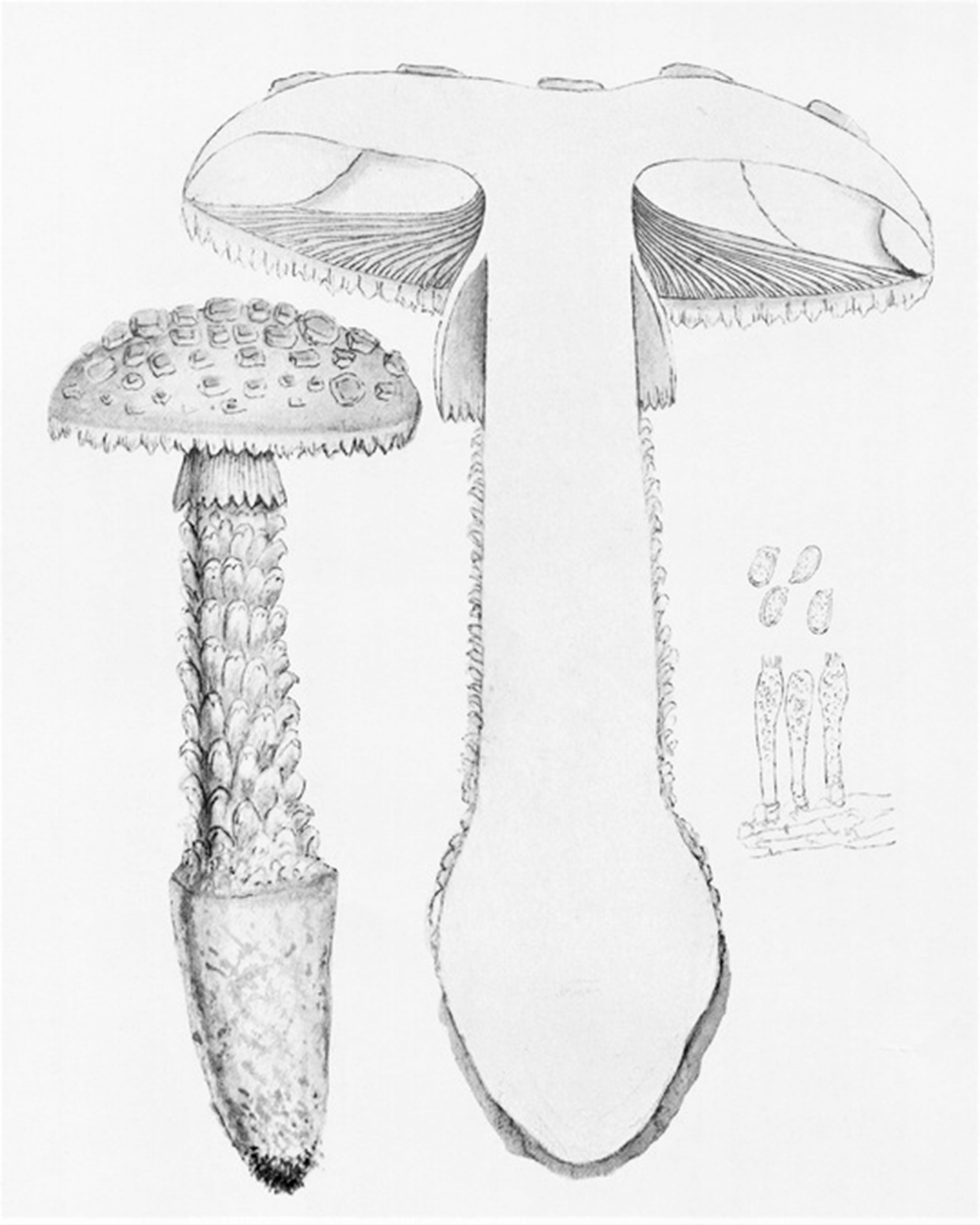 Giacomo Bresadola: Amanita strobiliformis (Paulet ex Vittad., 1835) Bertill. (1866) als Amanita solitaria (Bull., 1781) Mérat (1836) Bresadola meint auf Grund der Beschreibung hier eindeutig A. strobiliformis. Für A. boudieri Barla (1887) Bd. II/99 und A. echinocephala (1866) (Vittad., 1835) Quél. (1872) Bd. II/100 oder gar Lepiota aspera (Christian Hendrik Persoon|Pers. , 1793) Quél. (1886) Bd. I/27 hat er eigene Beschreibungen und Bilder.